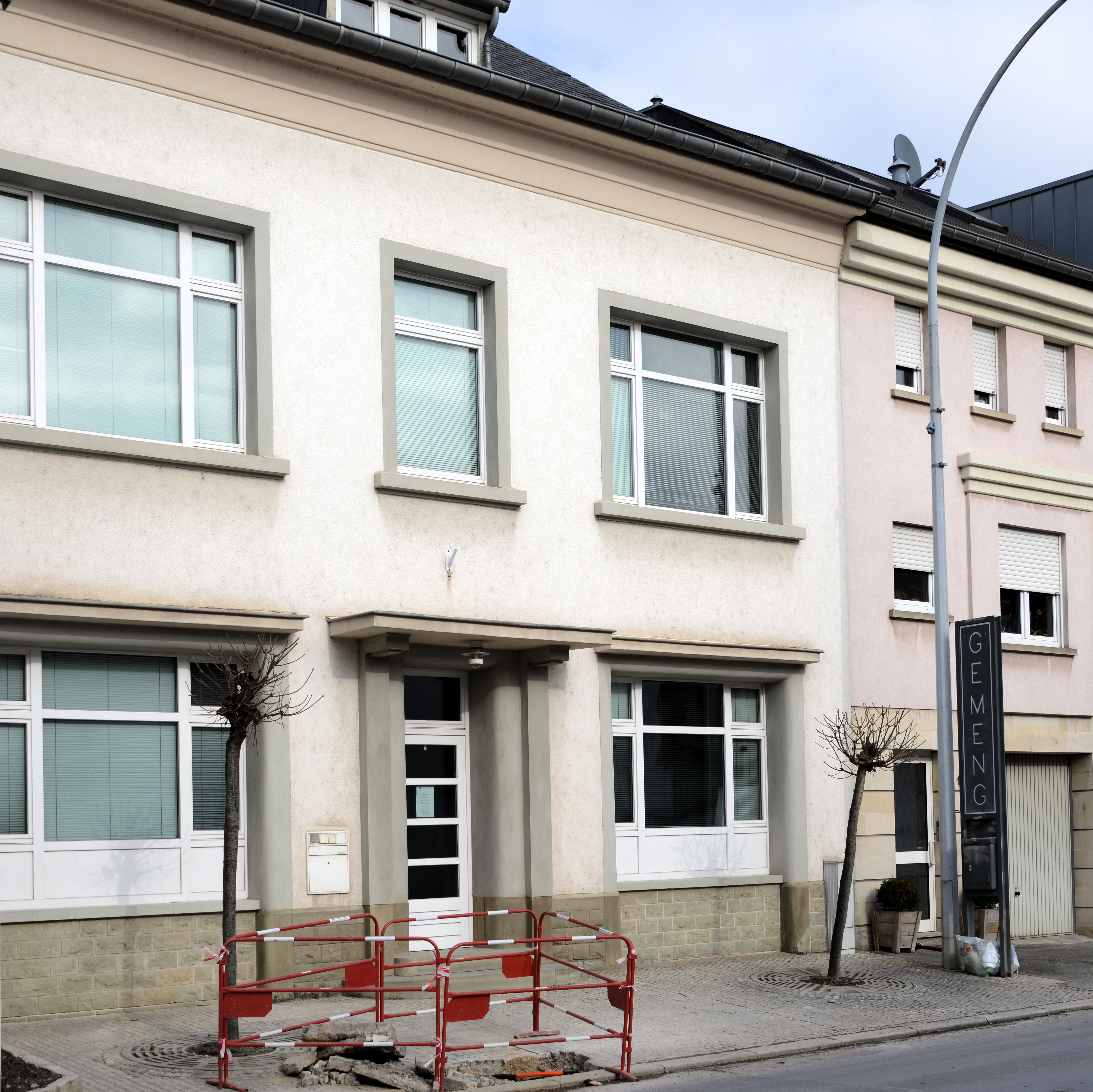 D'Märei an der Lëtzebuergerstrooss zu Bus.